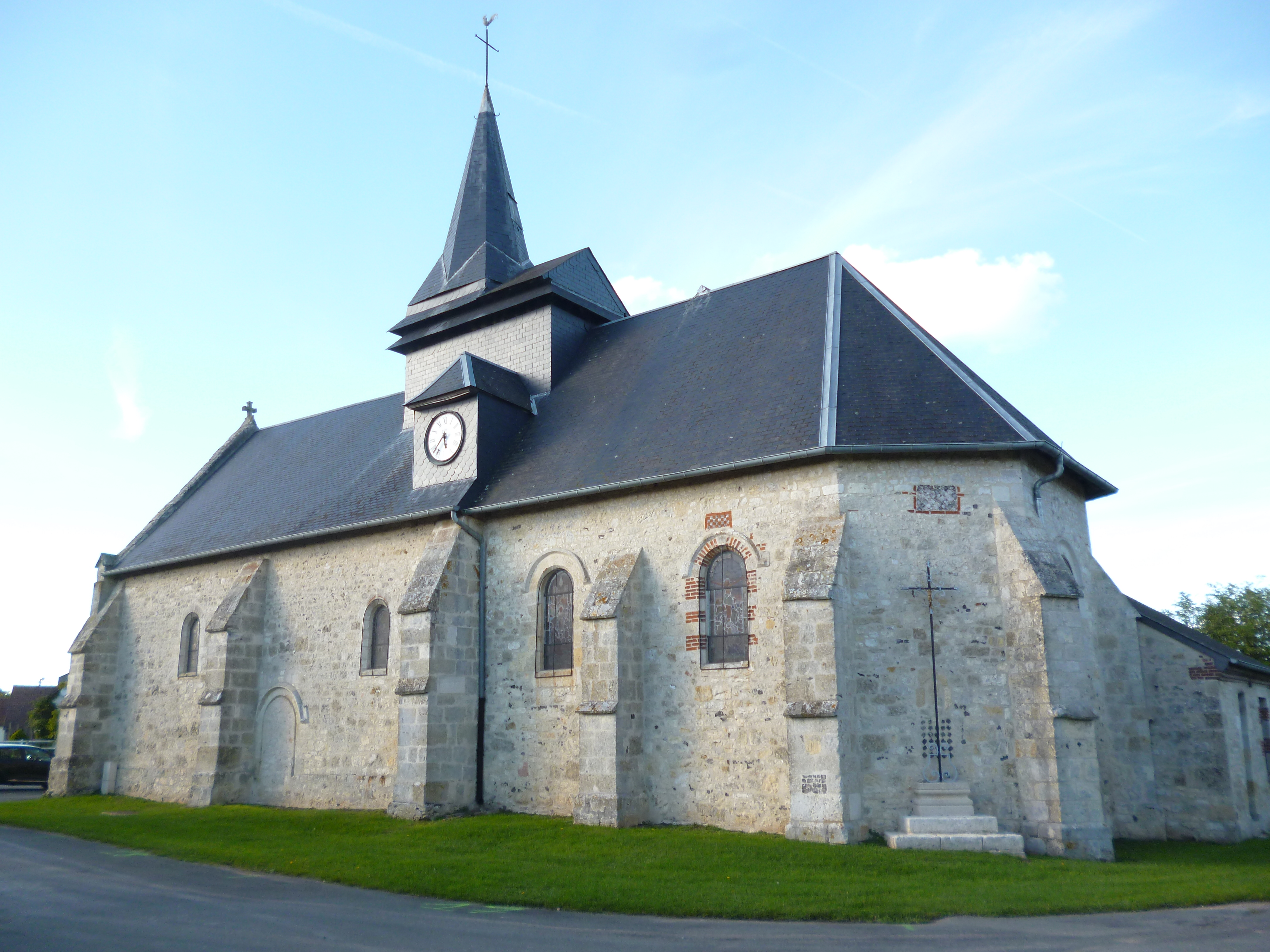 Eglise Notre-Dame-de-la-Nativité du Quesnel-Aubry (Oise).